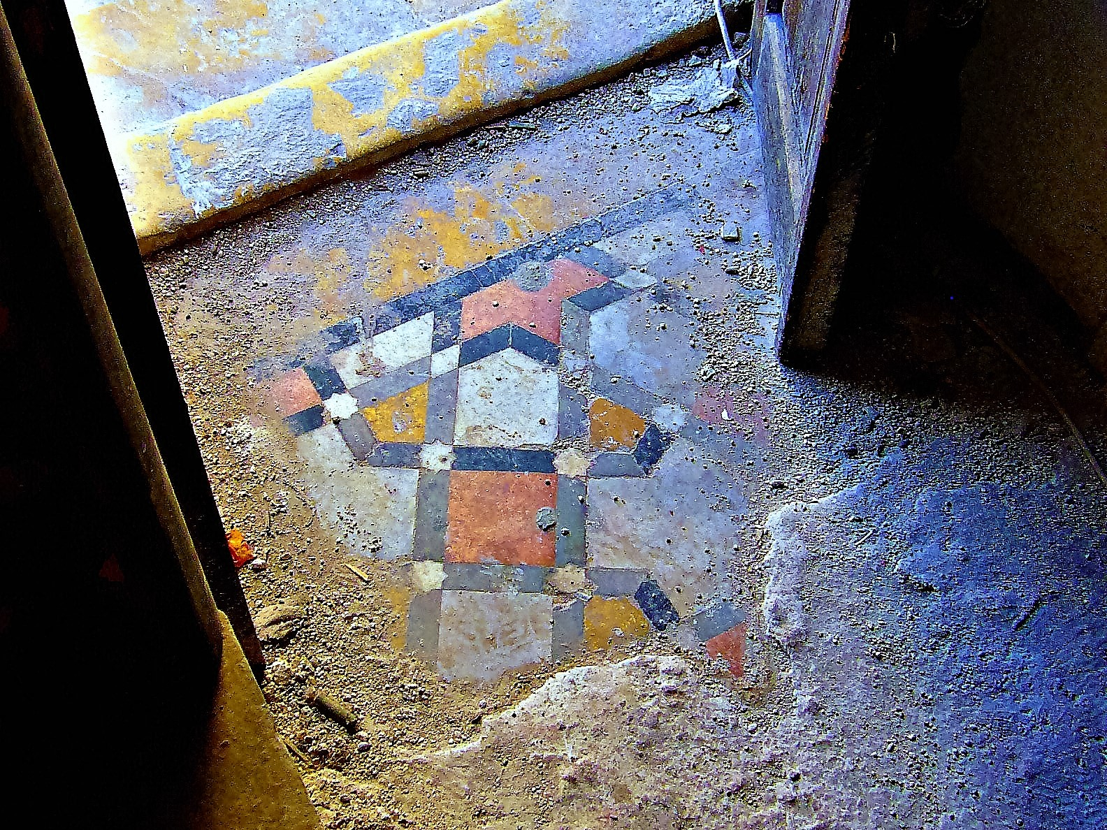 mattonelle palazzo ghazaleh